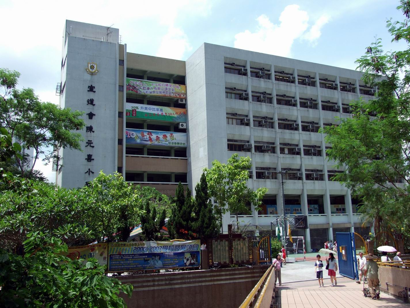 宣道會陳元喜小學